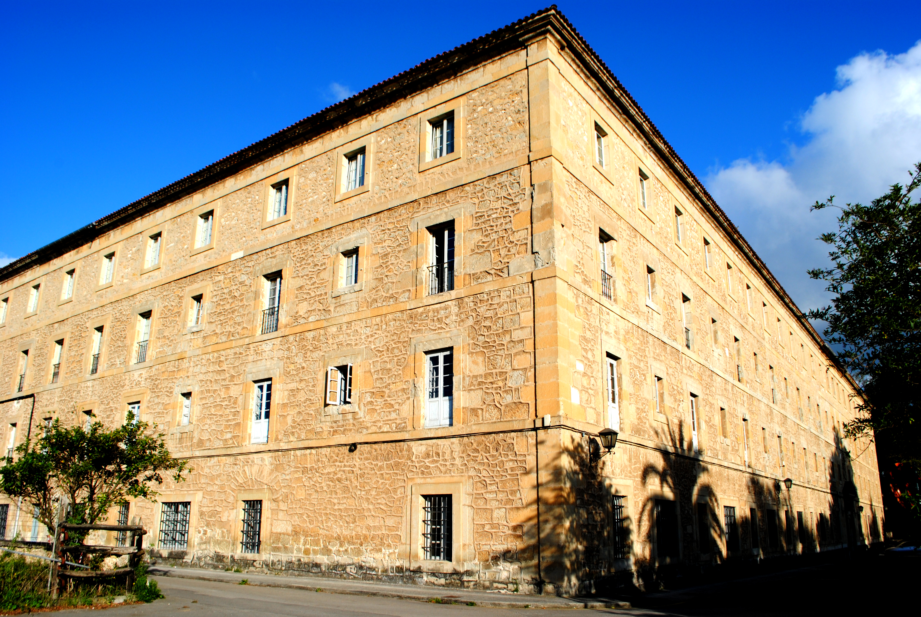 Fotografía del Seminario Monte Corbán